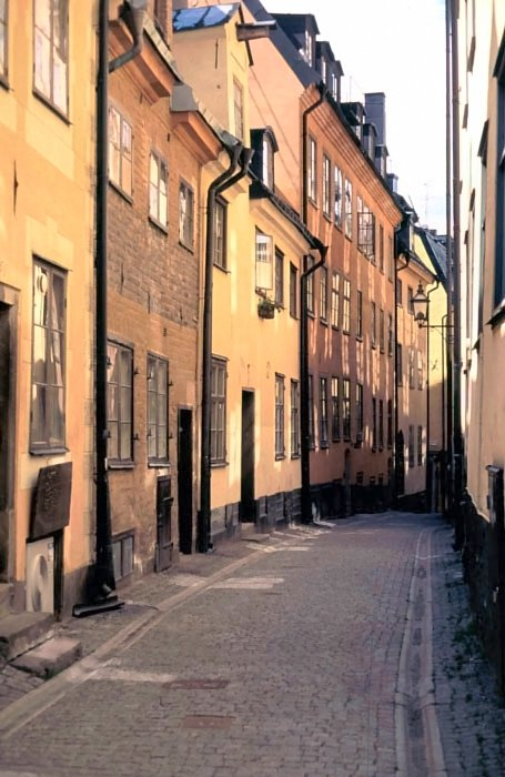 Street in Gamla Stan, Stockholm, Sweden